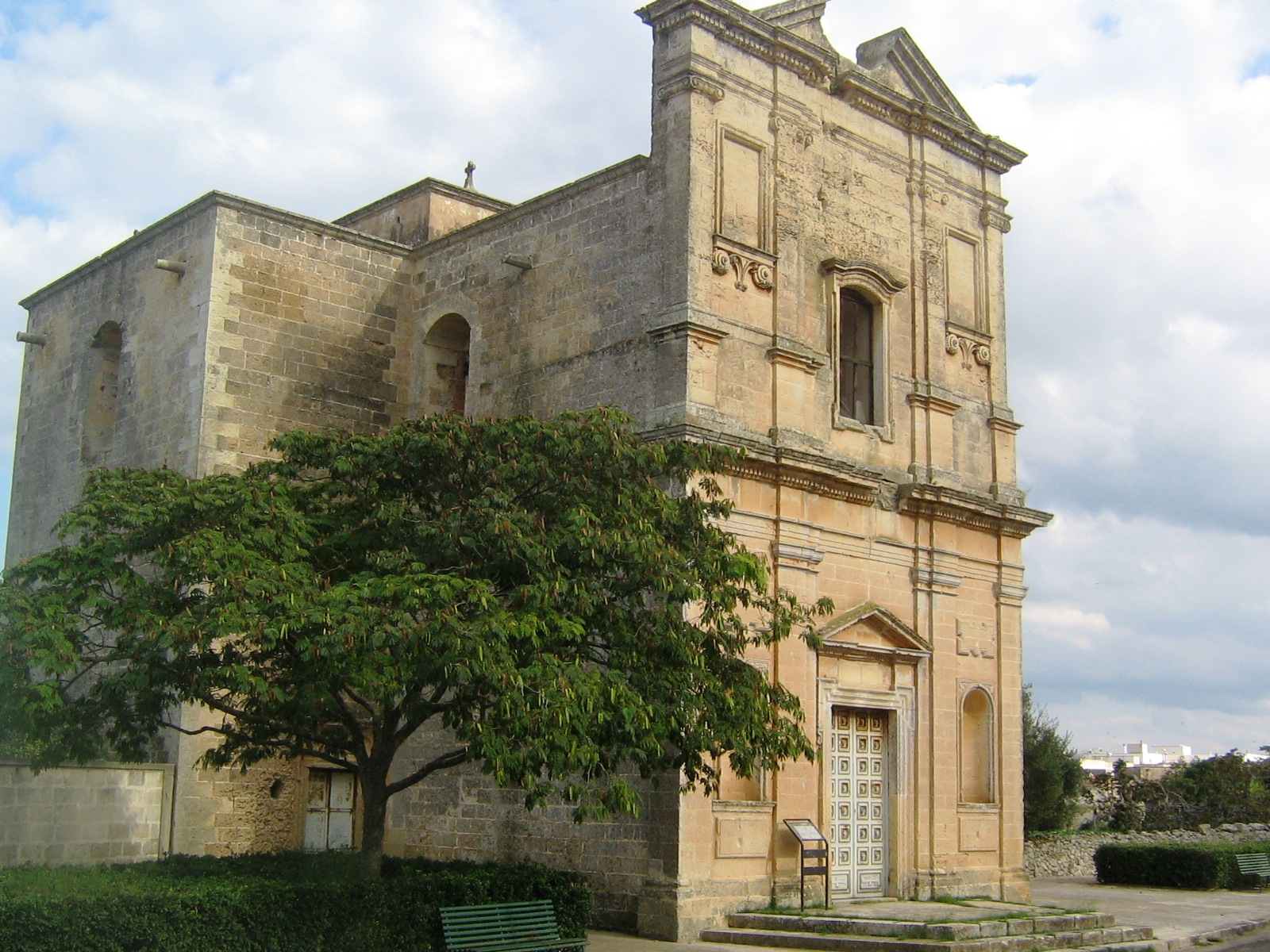 Caprarica di Lecce Chiesa del Crocifisso